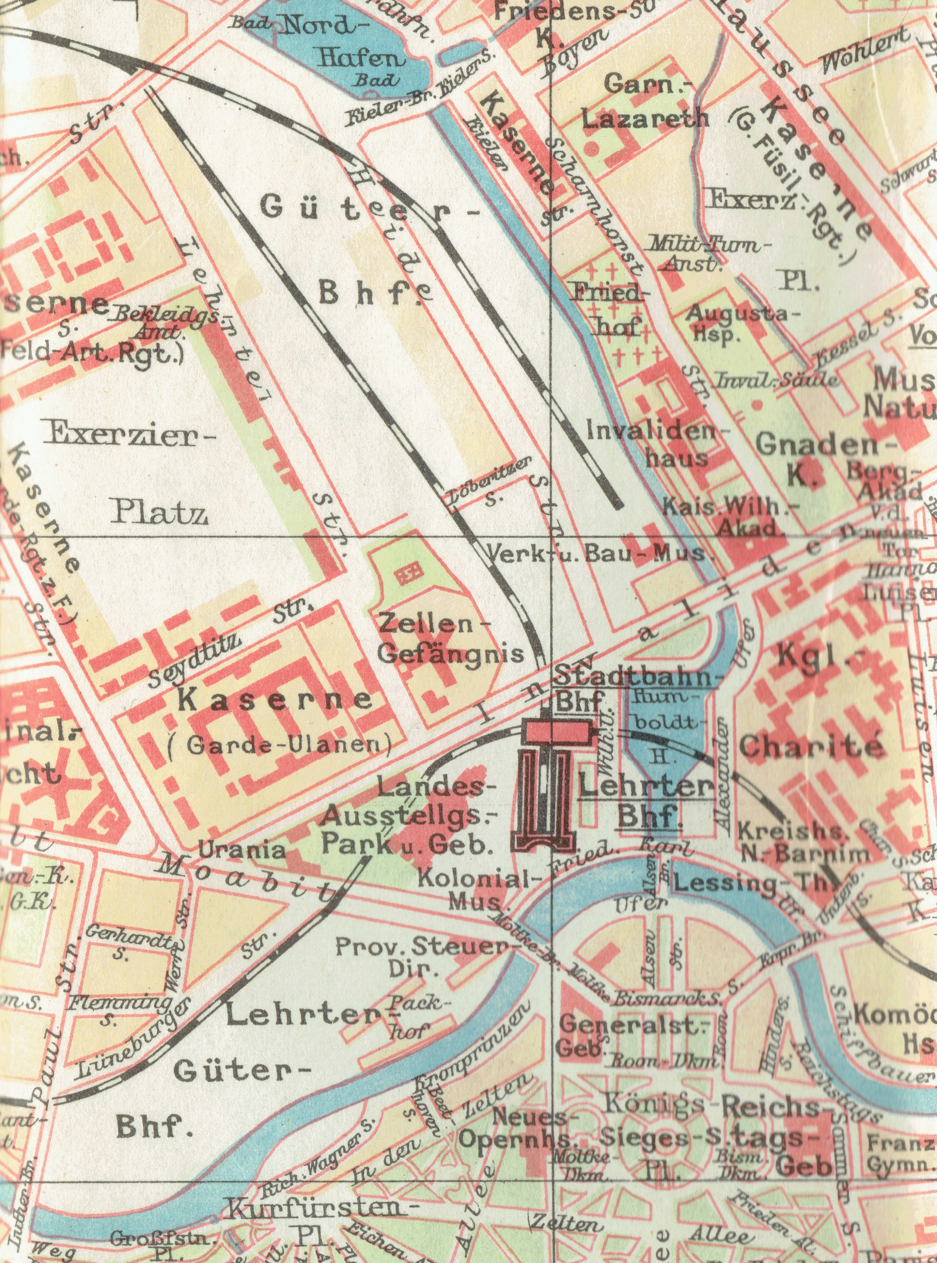 Richters Reiseführer: Berlin und Umgebung, Hamburg 1915. Kartenausschnitt Berlin-Mitte (Lehrter Bahnhof)